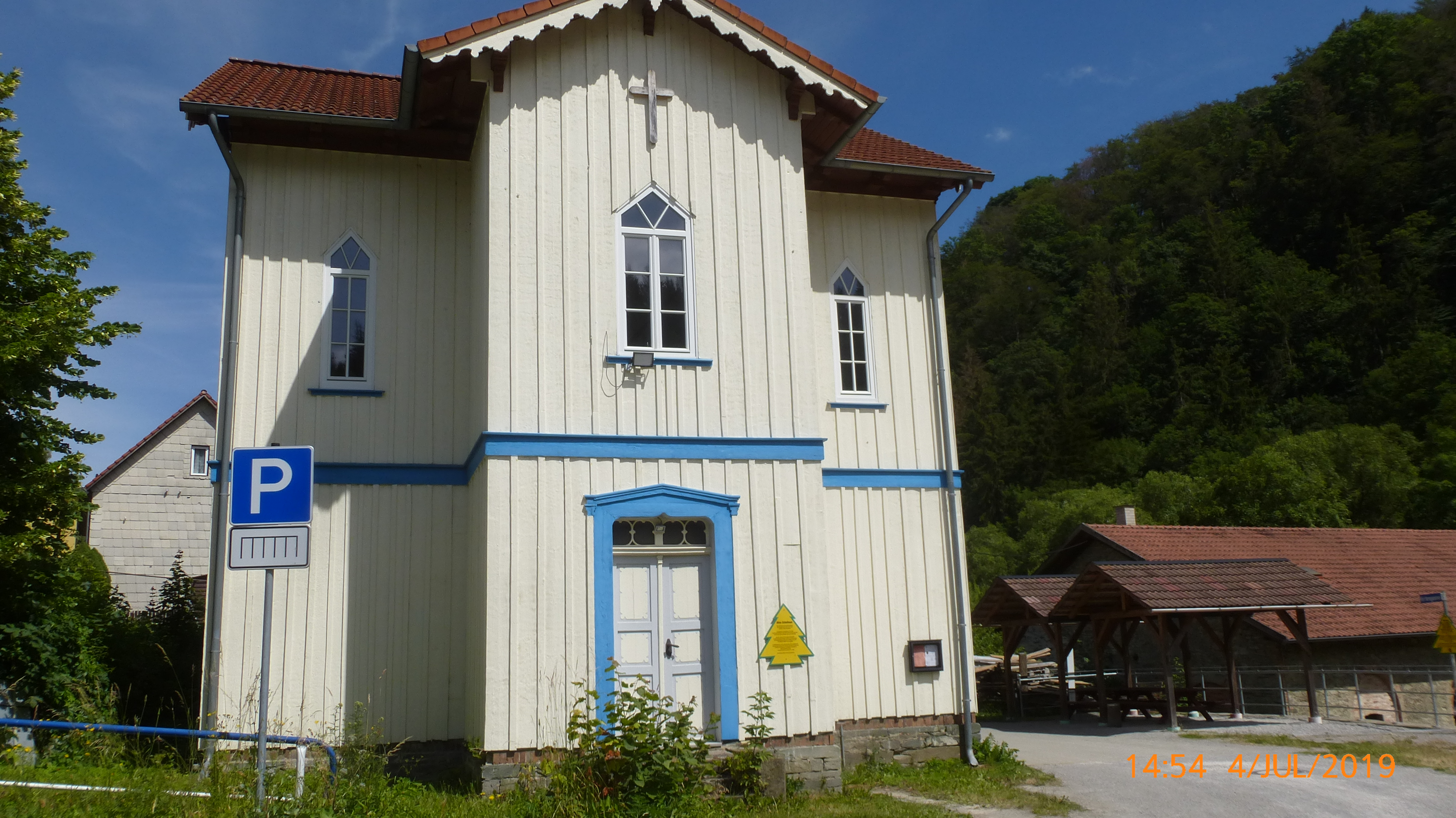 Neue Schule